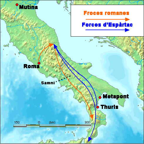 tercera guerra servil